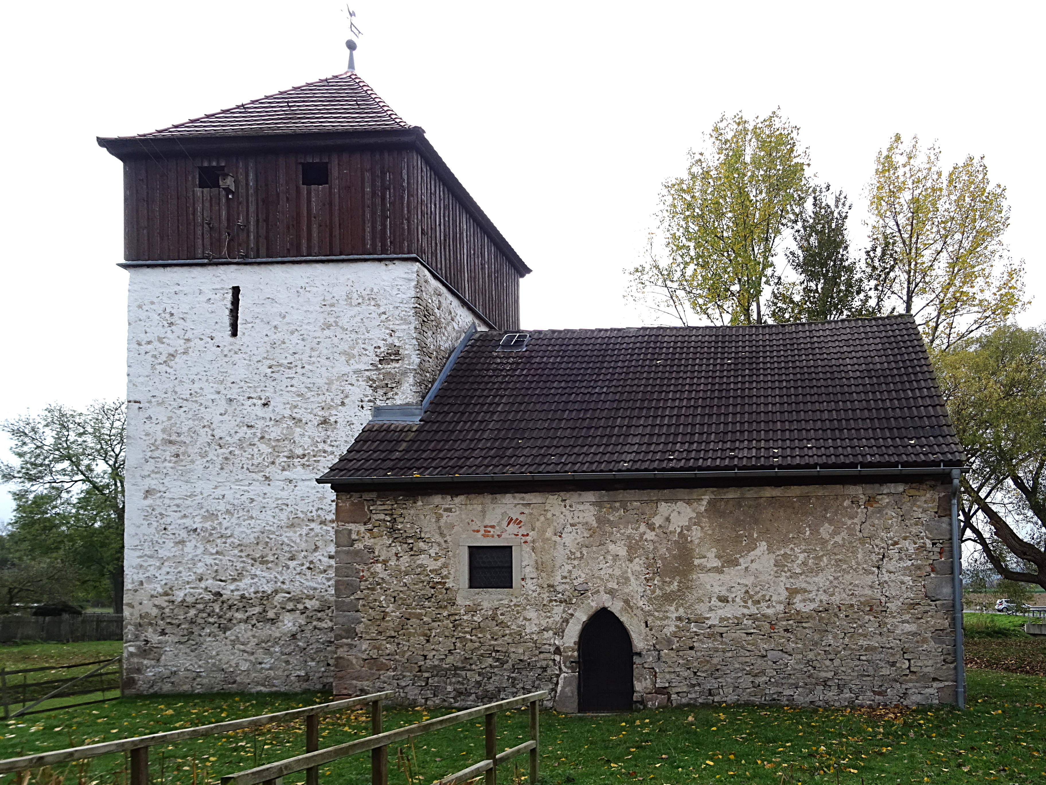 Wehrkirche Döblitz (Triptis) von Norden